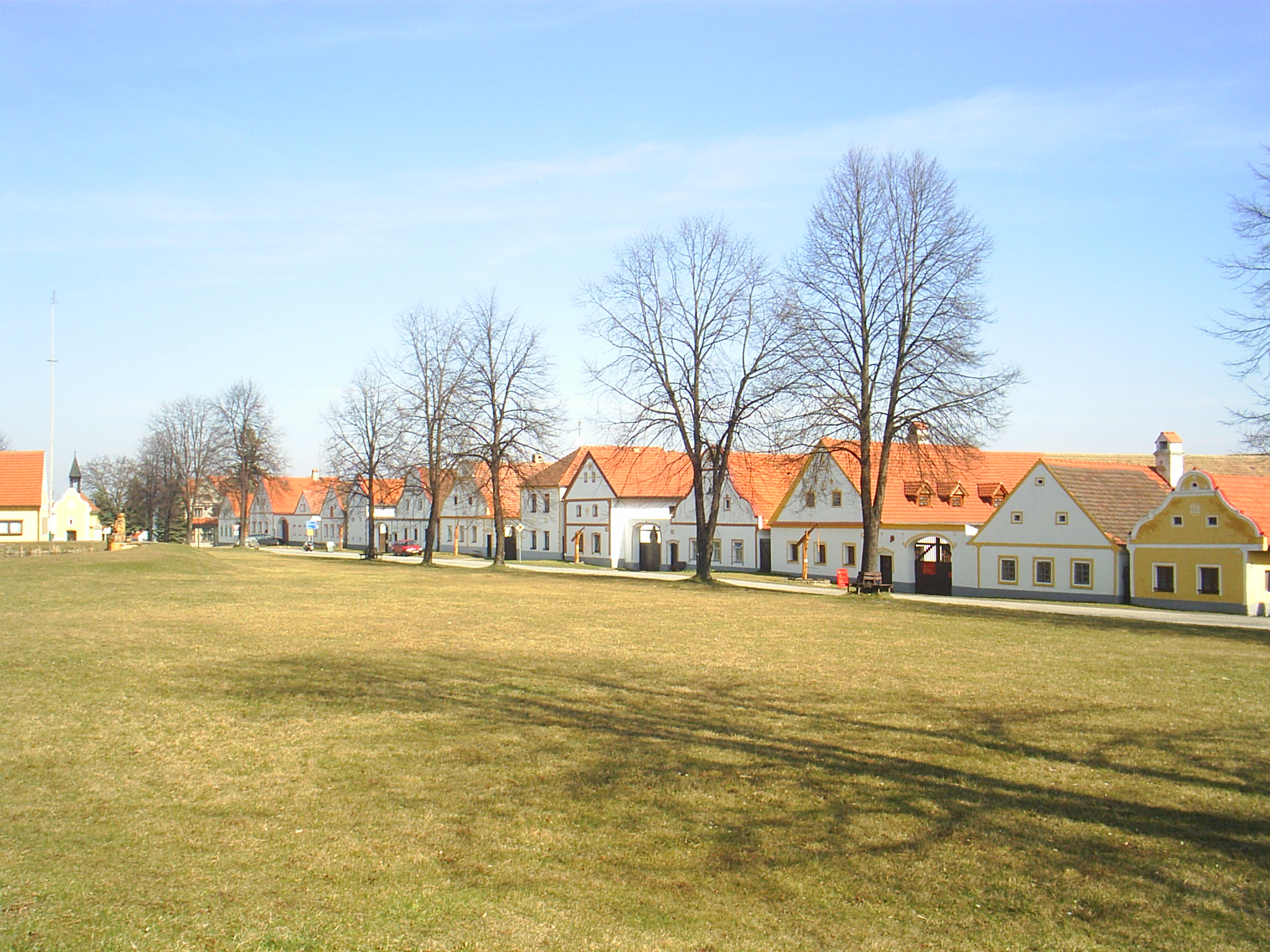 Holašovice-chráněná památka UNESCOEsperanto: Holašovice-protektata memorindaĵo de UNESCO